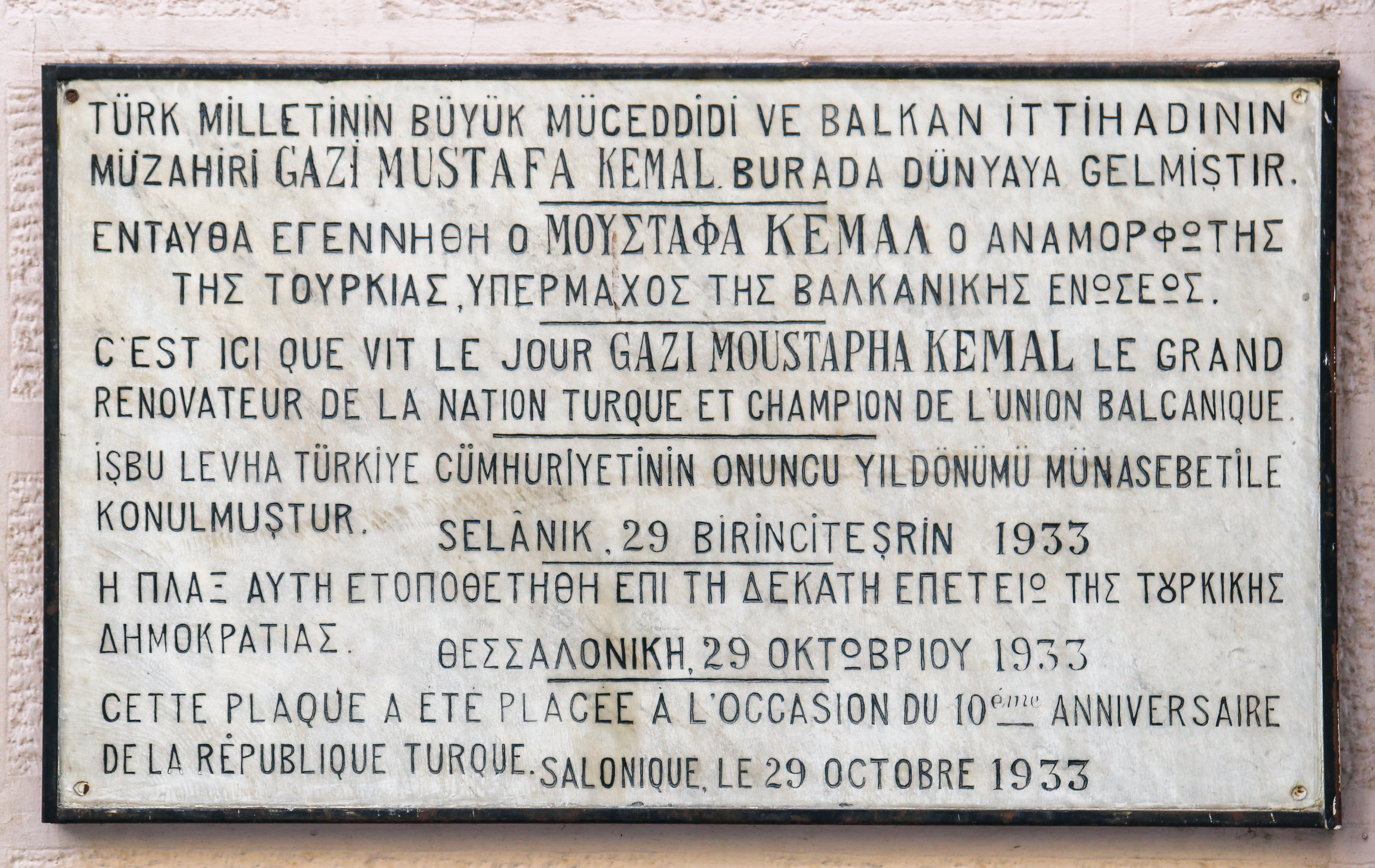 Selanik Atatürk Evi Müzesi'ndeki tanıtıcı levha